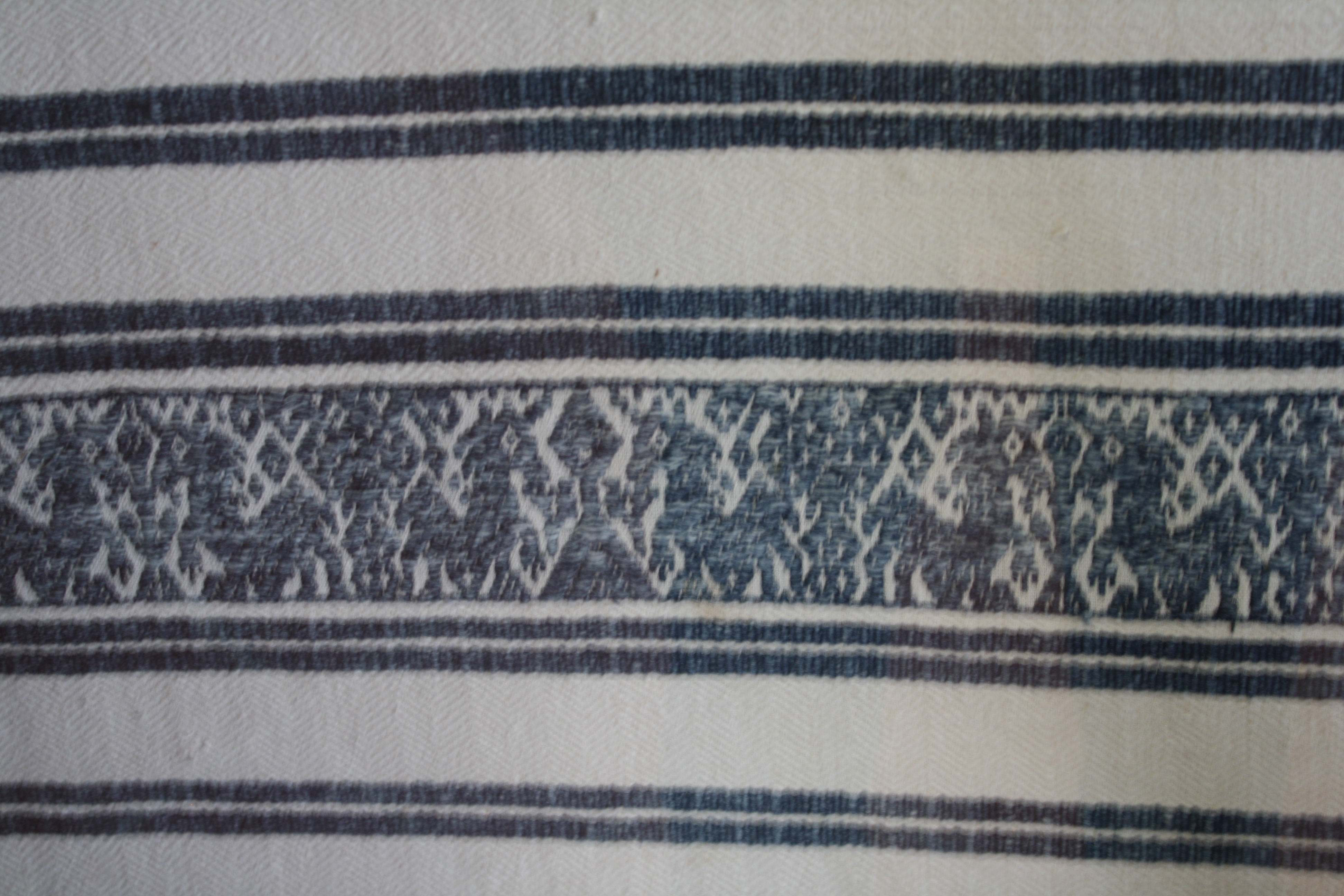 Telo Umbro- particolare